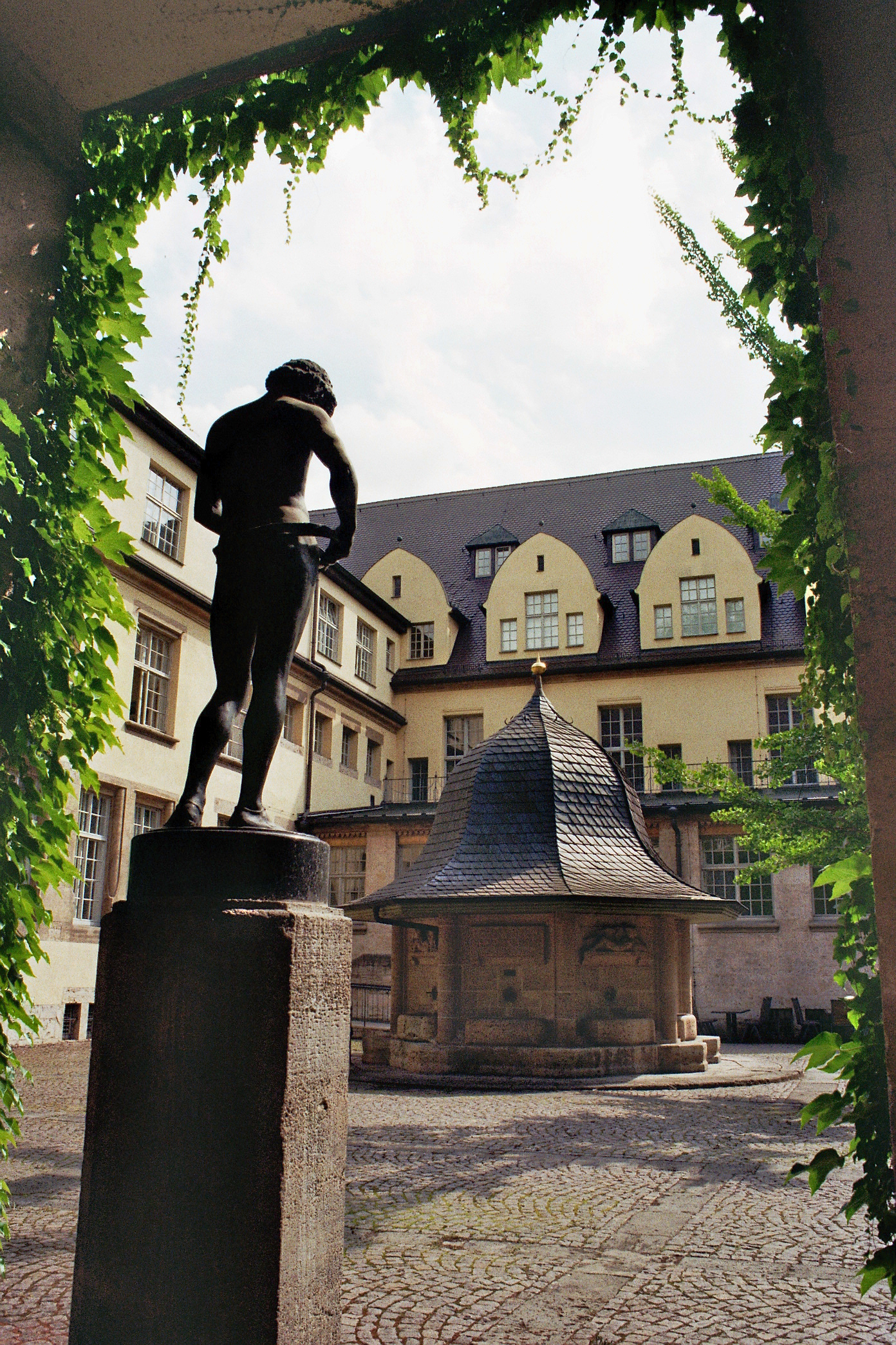 Der Innenhof des Universitätshauptgebäudes der Friedrich-Schiller-Universität Jena.